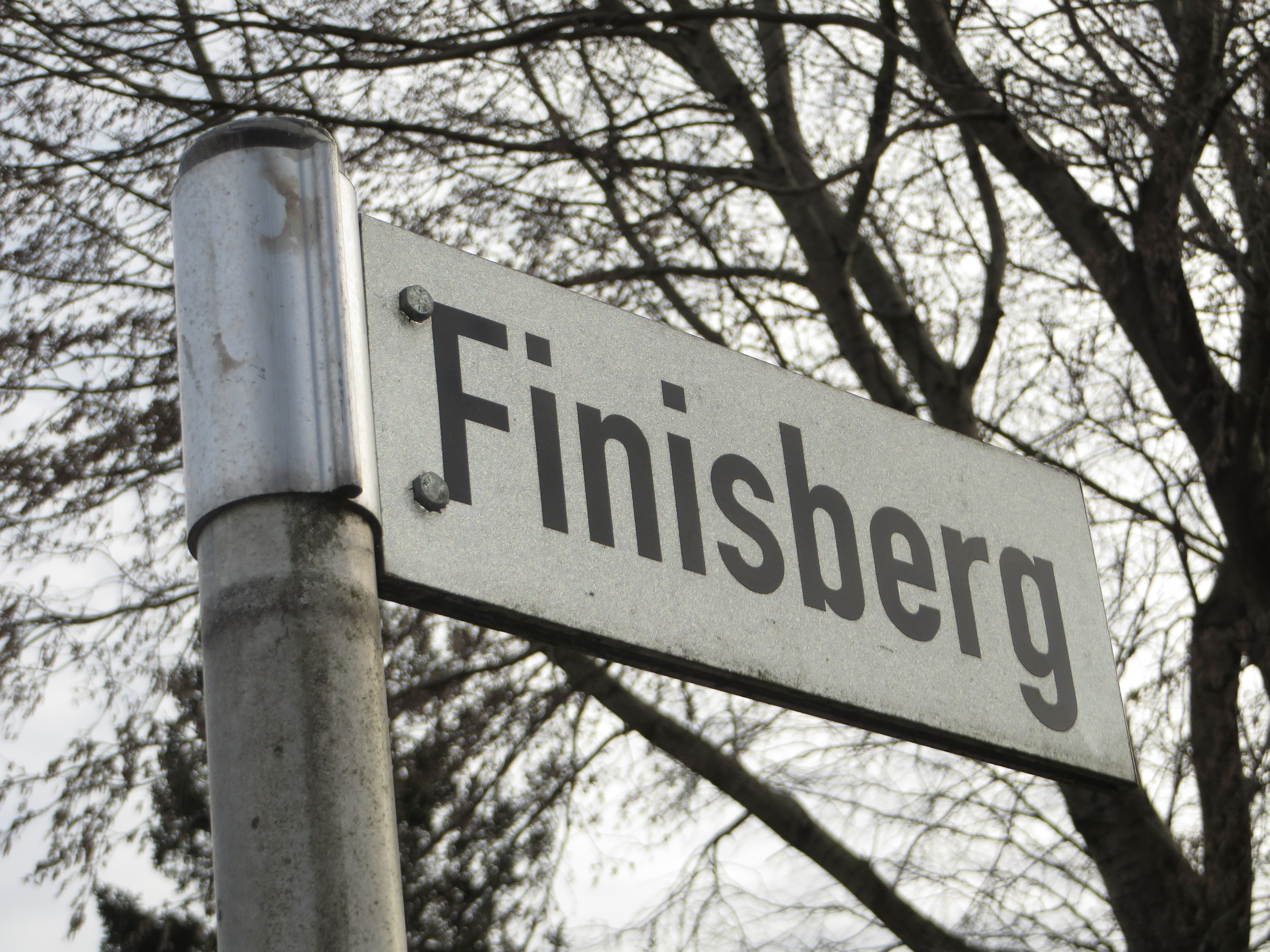 Straßenschild Finisberg (Flensburg 2015), Bild 03